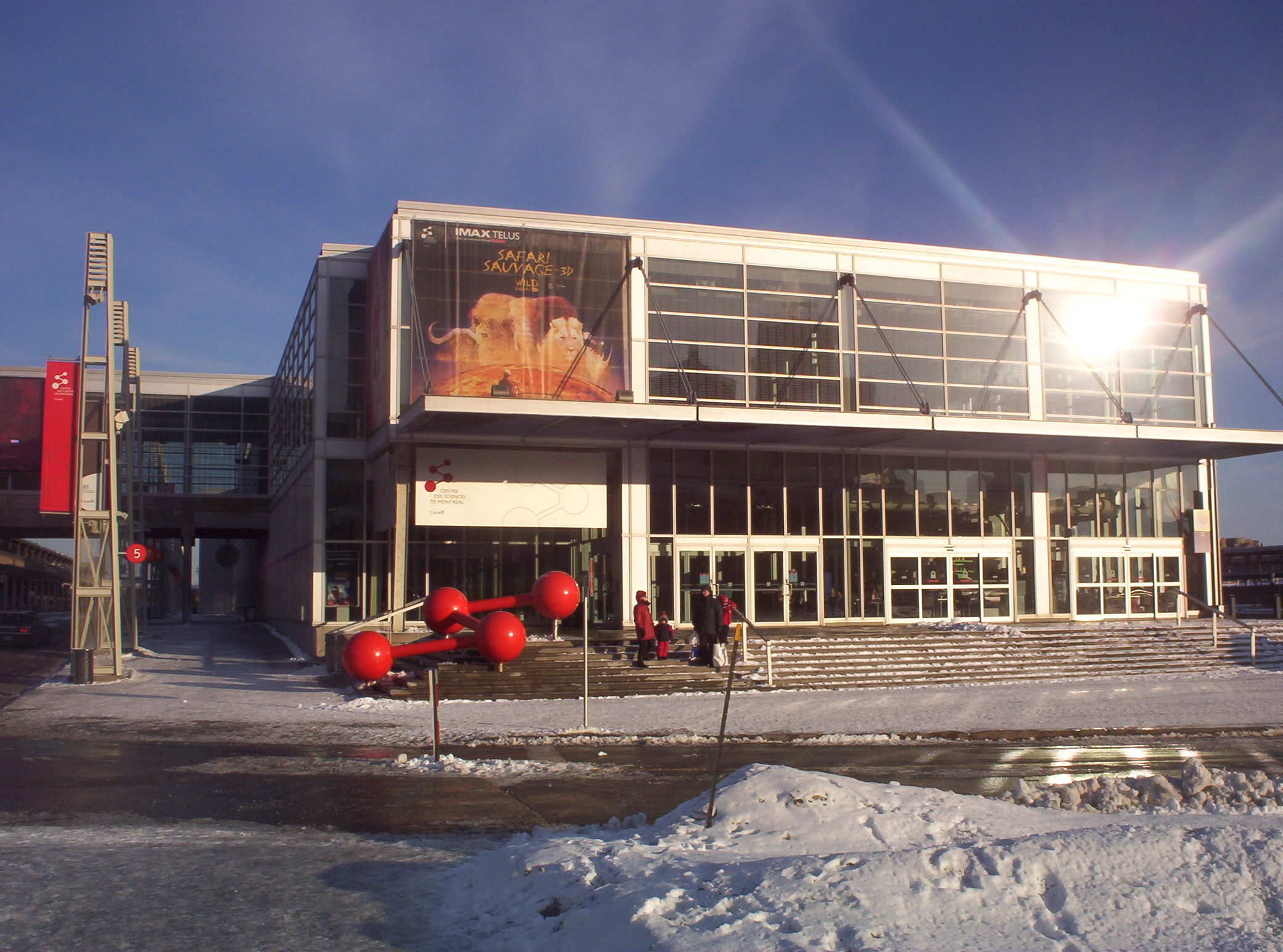 Summary: Centre des Sciences de Montréal, Québec Author: Colocho Date: January 22nd, 2006